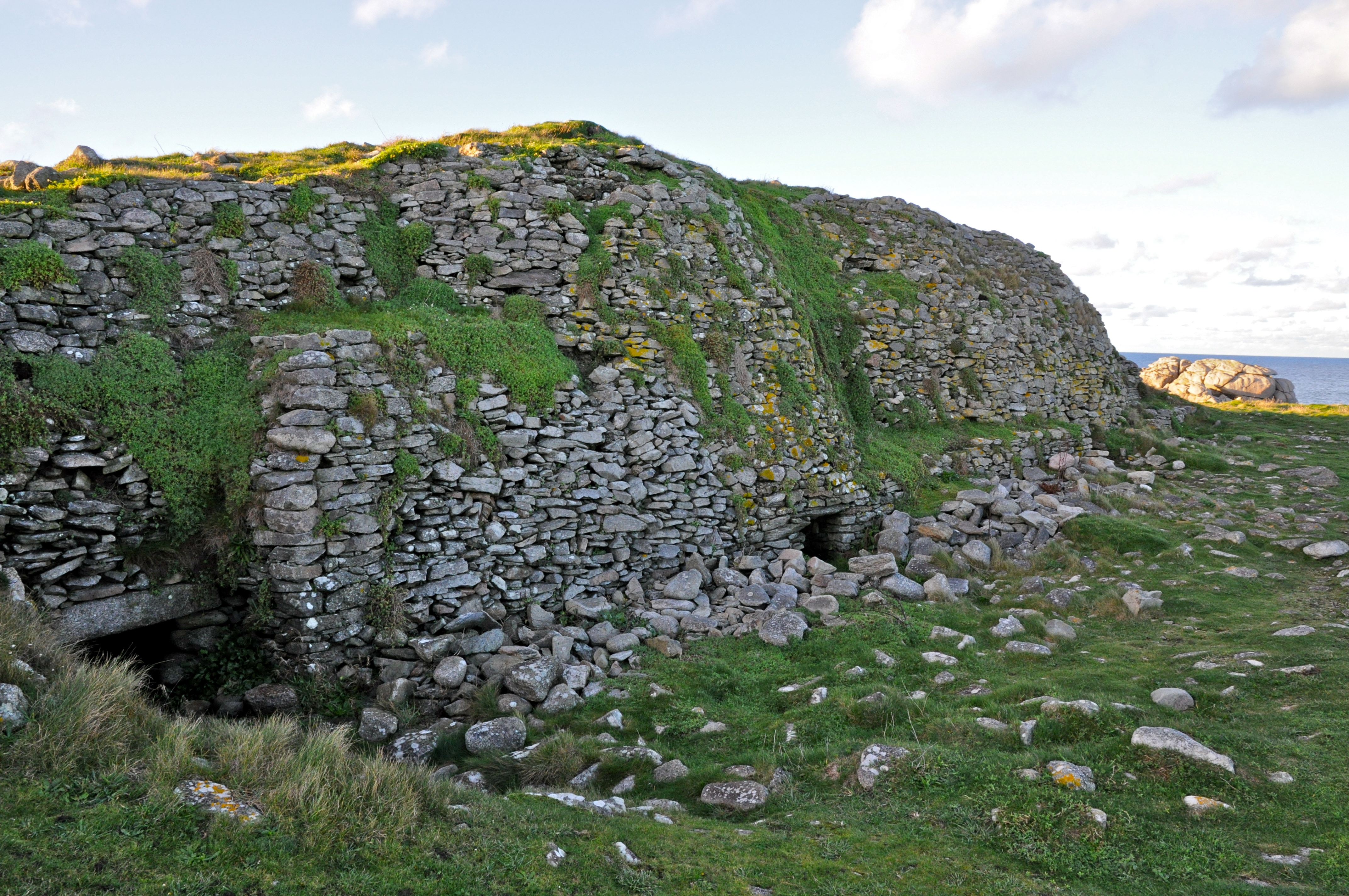 Le cairn de l'île Carn (6000 ans d'âge) en PLOUDALMEZEAU